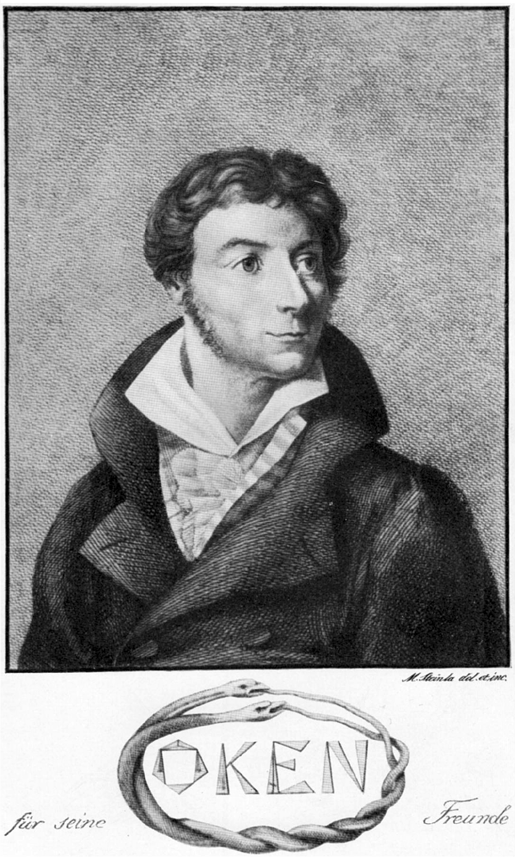 Lorenz Oken